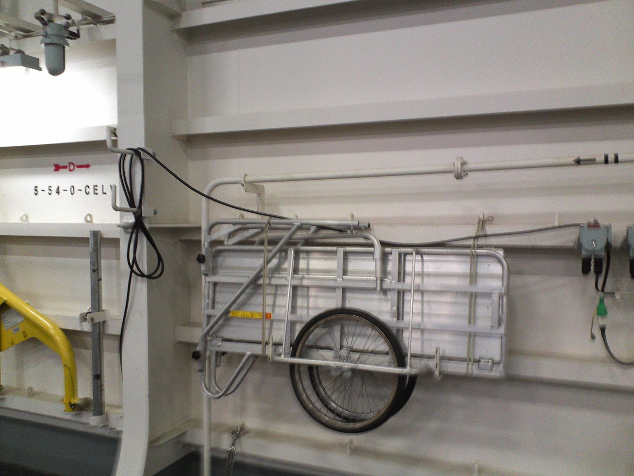 海上自衛隊護衛艦「ひゅうが」の航空機格納庫に搭載されているアルミ製折りたたみリアカー